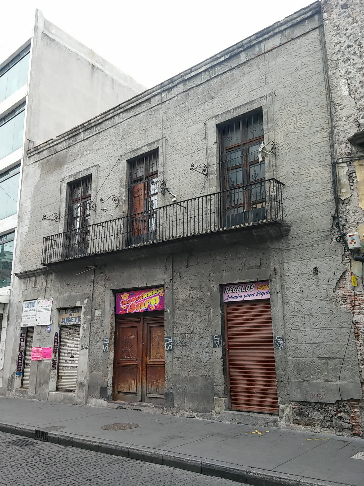 Casa donde murió Doña Josefa Ortiz de Domínguez, Calle del Carmen, Ciudad de México.